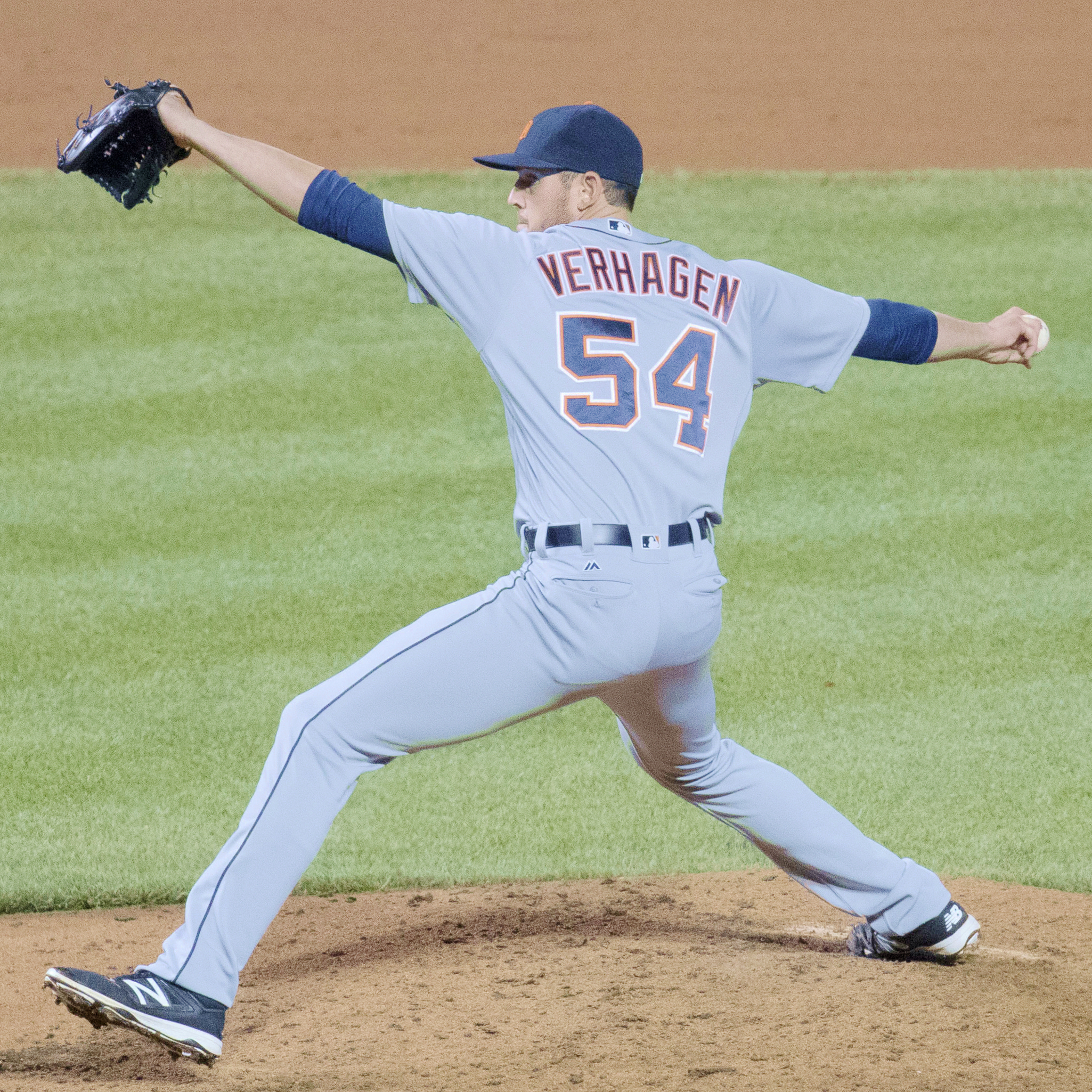 Drew VerHagen